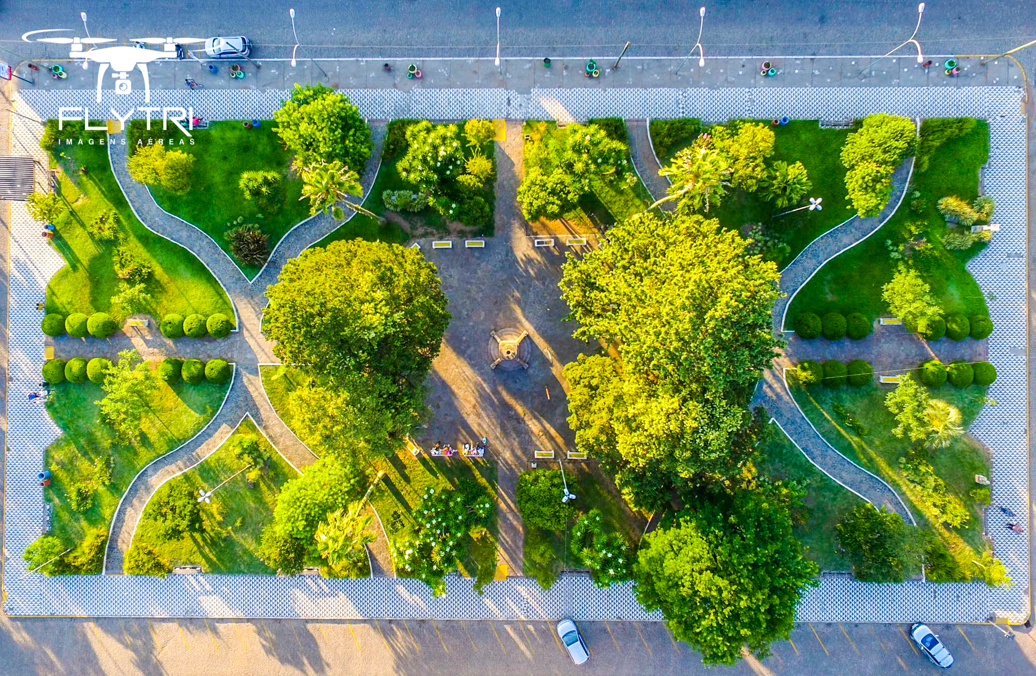 Foto aérea da Praça Dr. Ozzy Teixeira